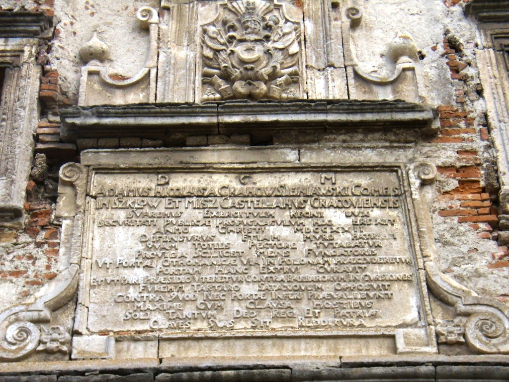 Мiська брама (мур.), Сатанів